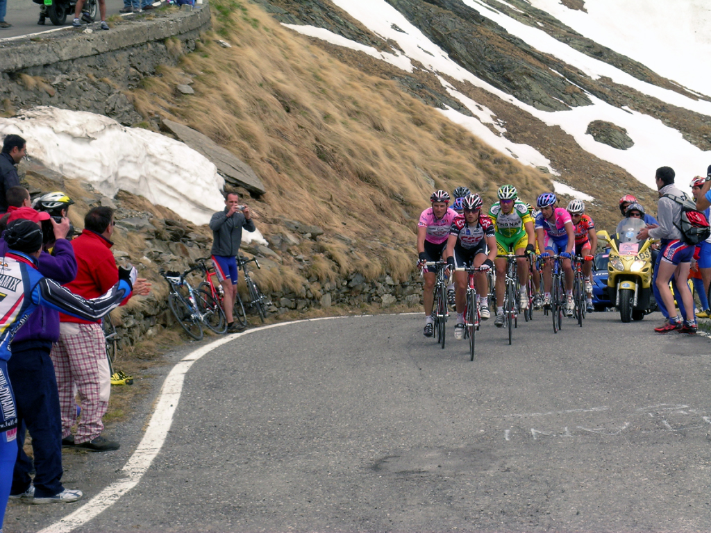 Giro d'Italia 2006 - Passo Gavia 2621 s.l.m - Maglia Rosa Group